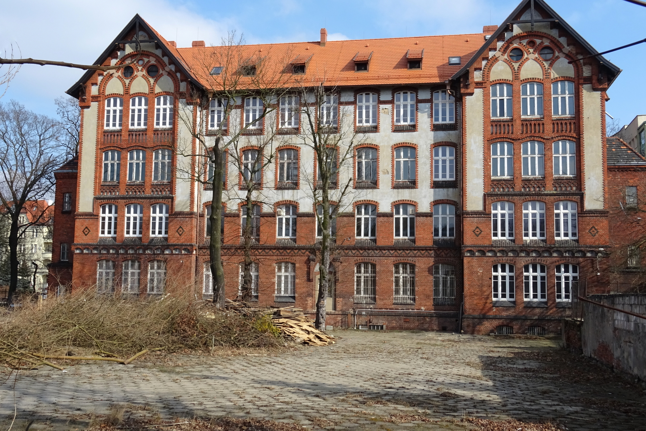 Poznań. Dawna szkoła gminna na Wildzie - elewacja podwórzowa.